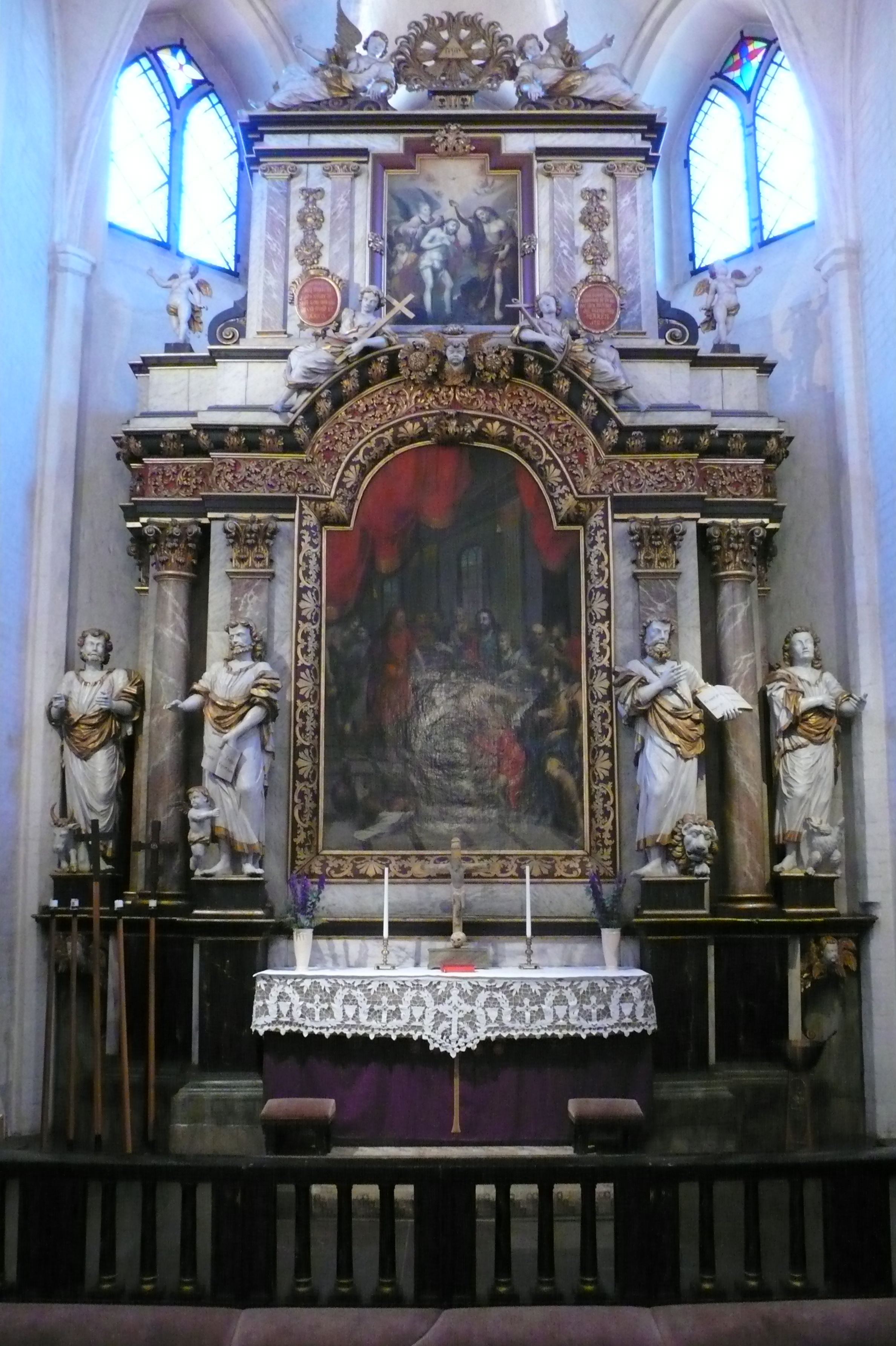 Altar in der Kirche Sankta Maria in Ystad